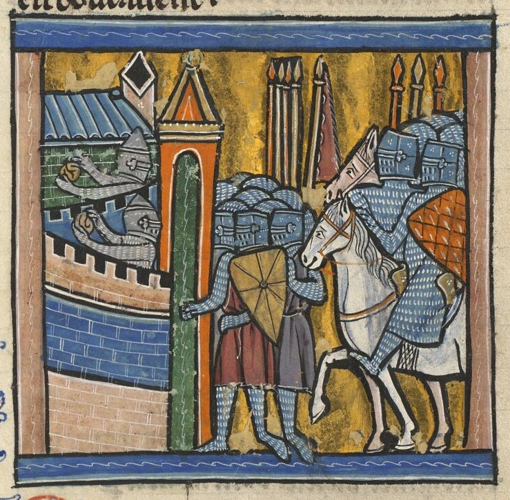 Siège de Nicée (1097)